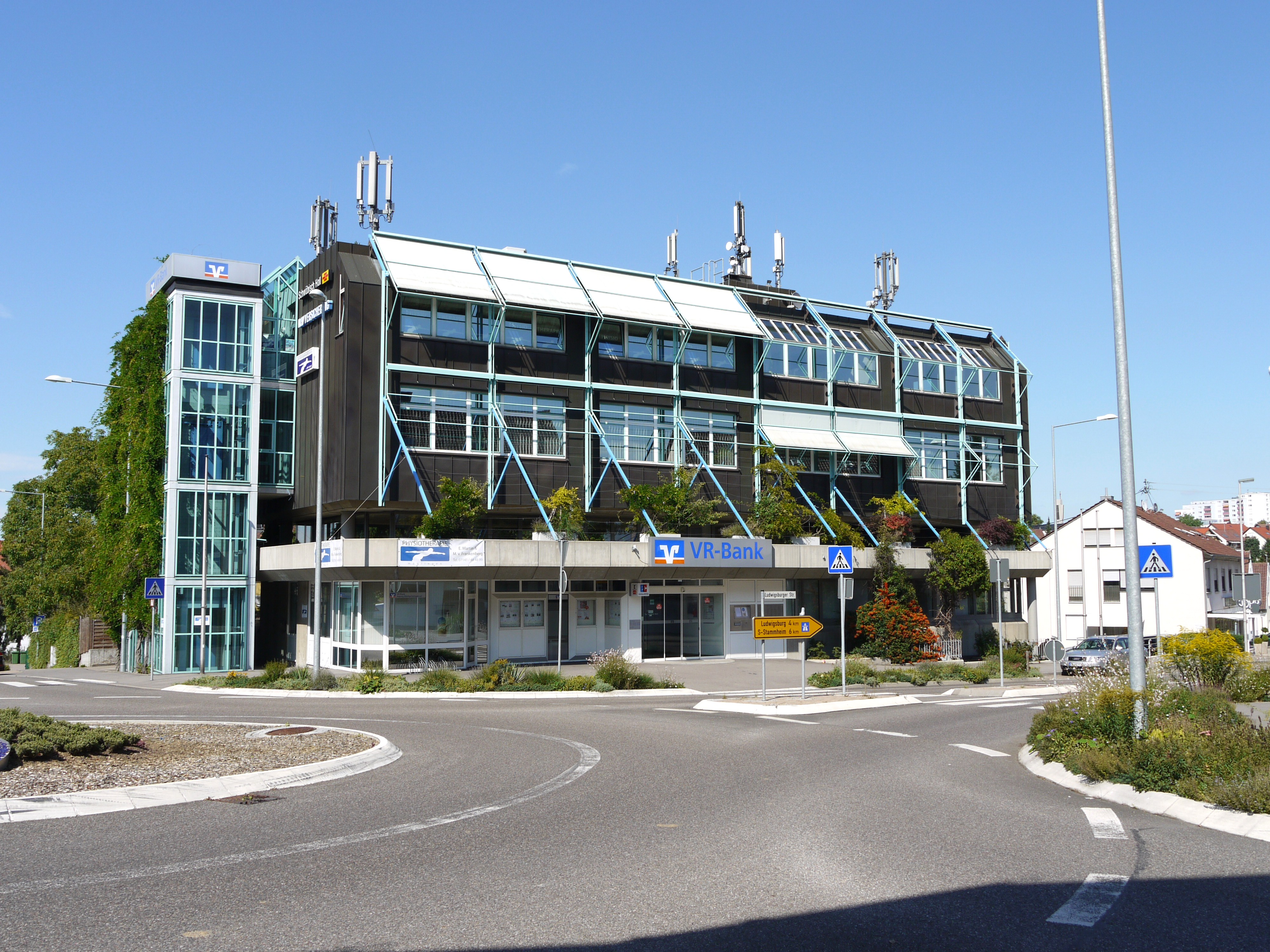 Hauptgebäude der VR-Bank Asperg-Markgröningen eG in Möglingen